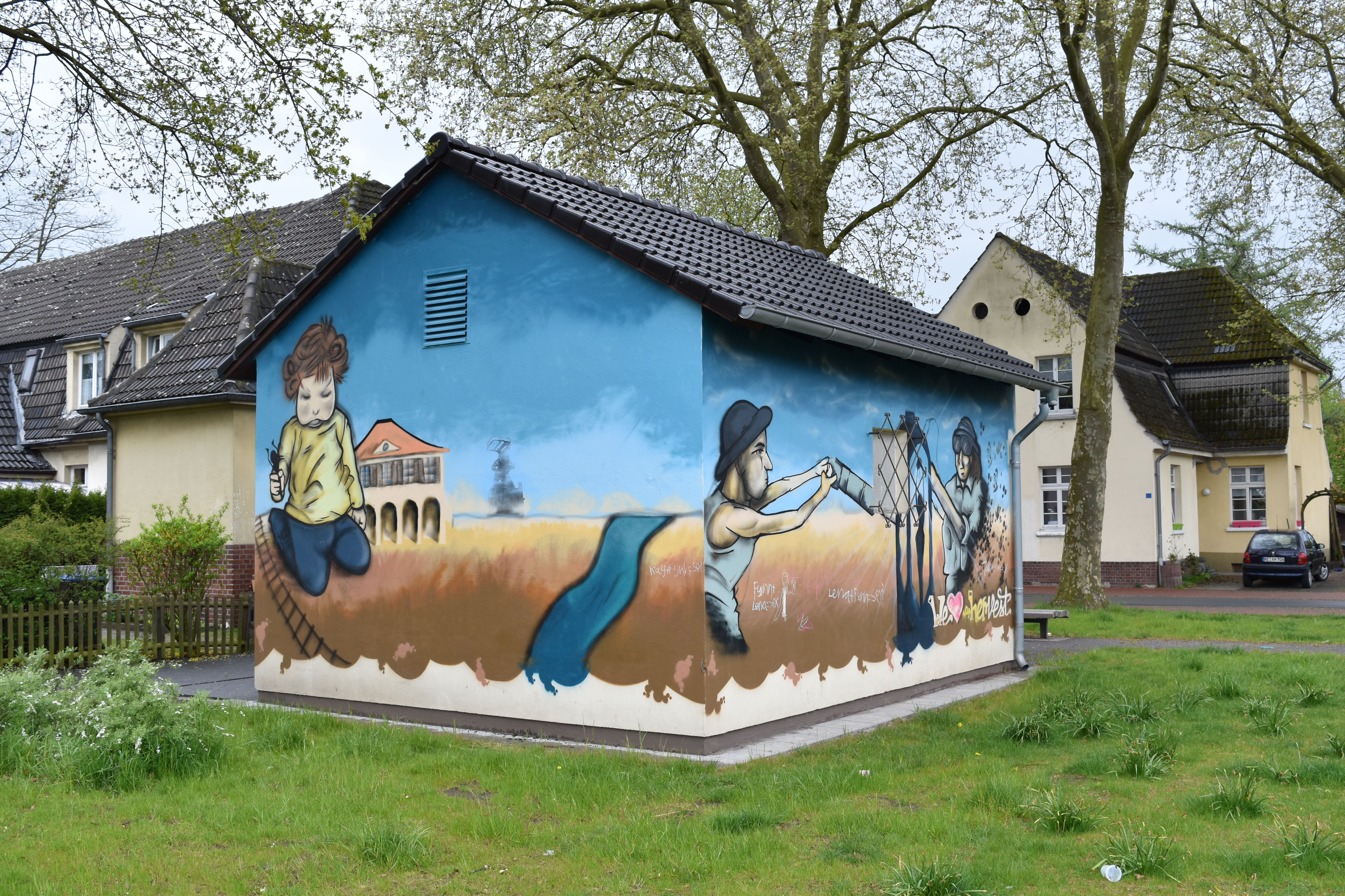 Transformatorenstation bzw. Trafohäuschen an der ehemaligen Hafenbahn und jetzigen Bahntrasse. Graffiti "Schwarzes Gold". Siedlung Fürst Leopold in Dorsten, Stadtteil Hervest, Nordrhein-Westfalen